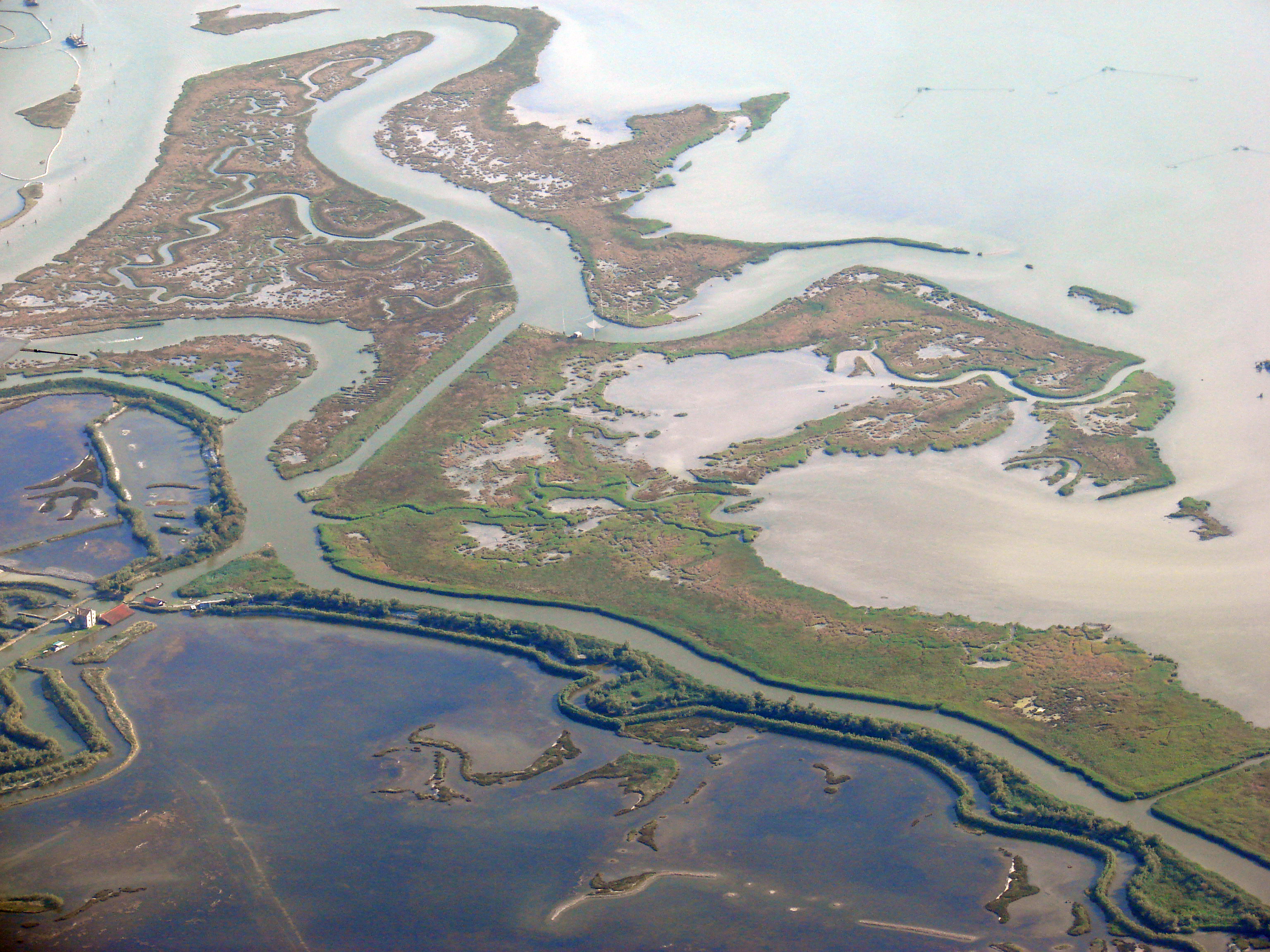 Vue d'avion de la lagune de Venise